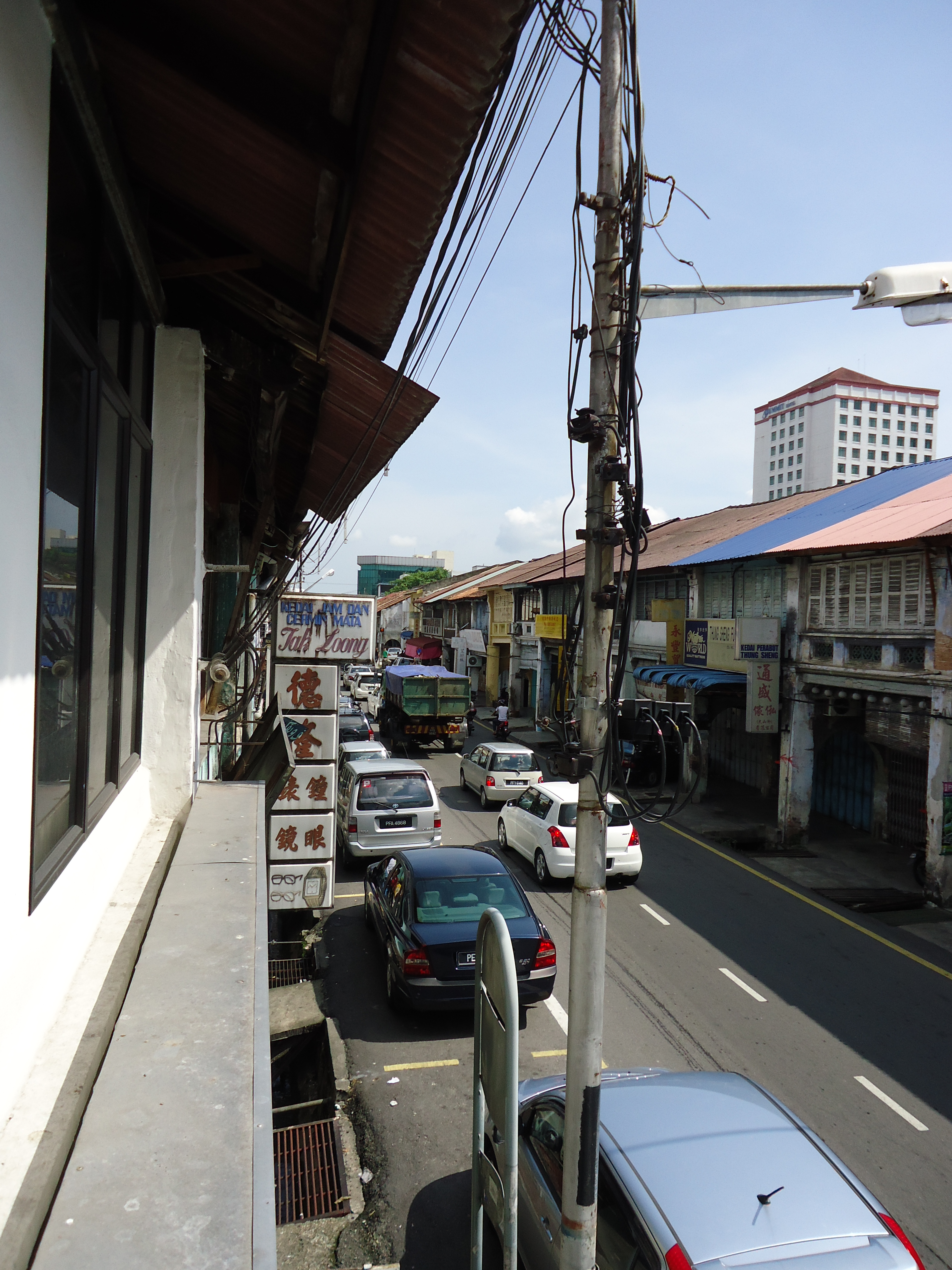 jalan ooh chooi cheng